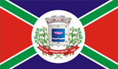 Bandeira de Cândido Sales